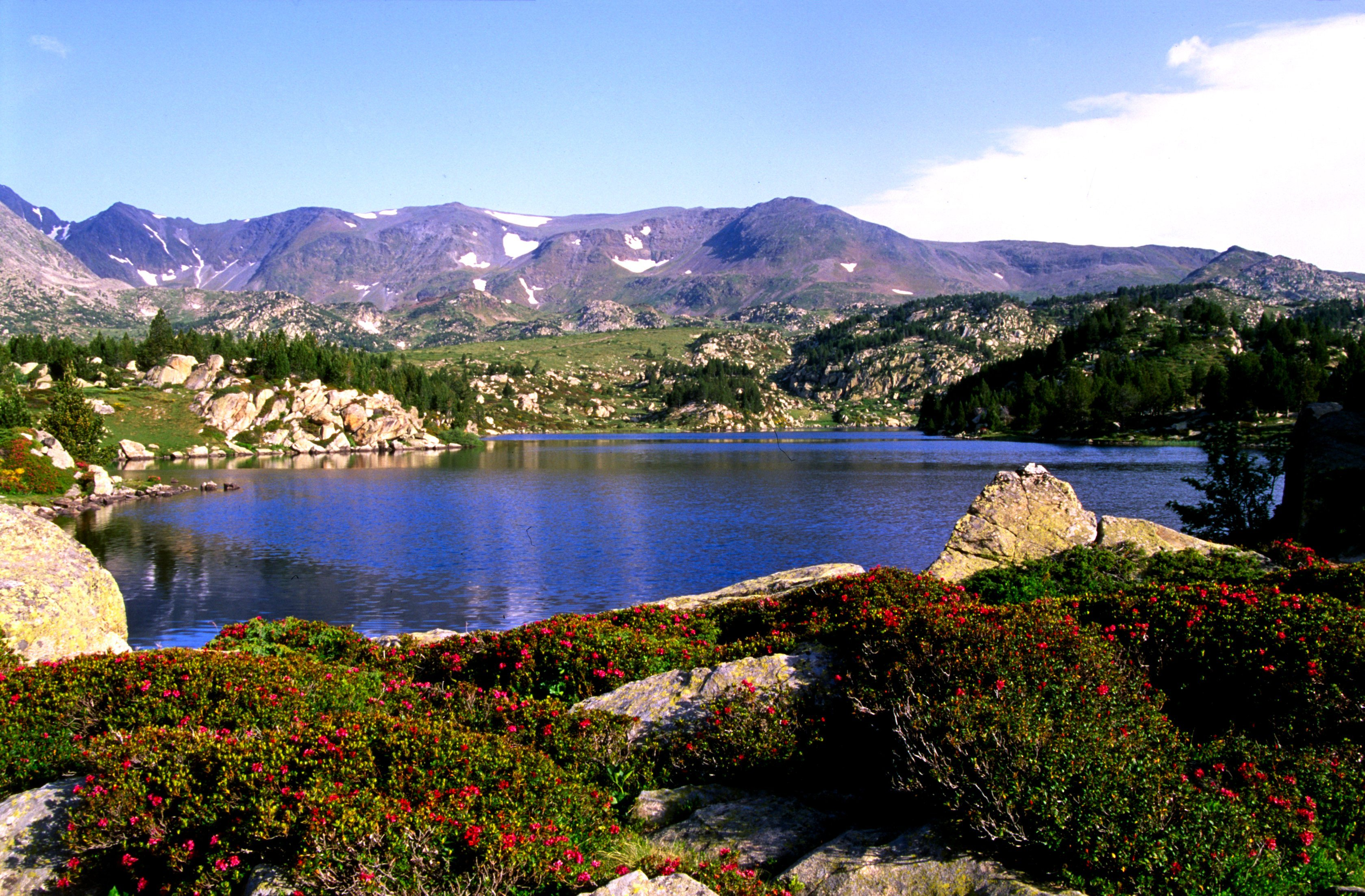 lacs du Carlit